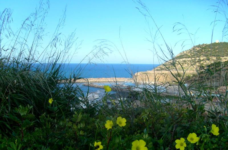 la ville de Honaine